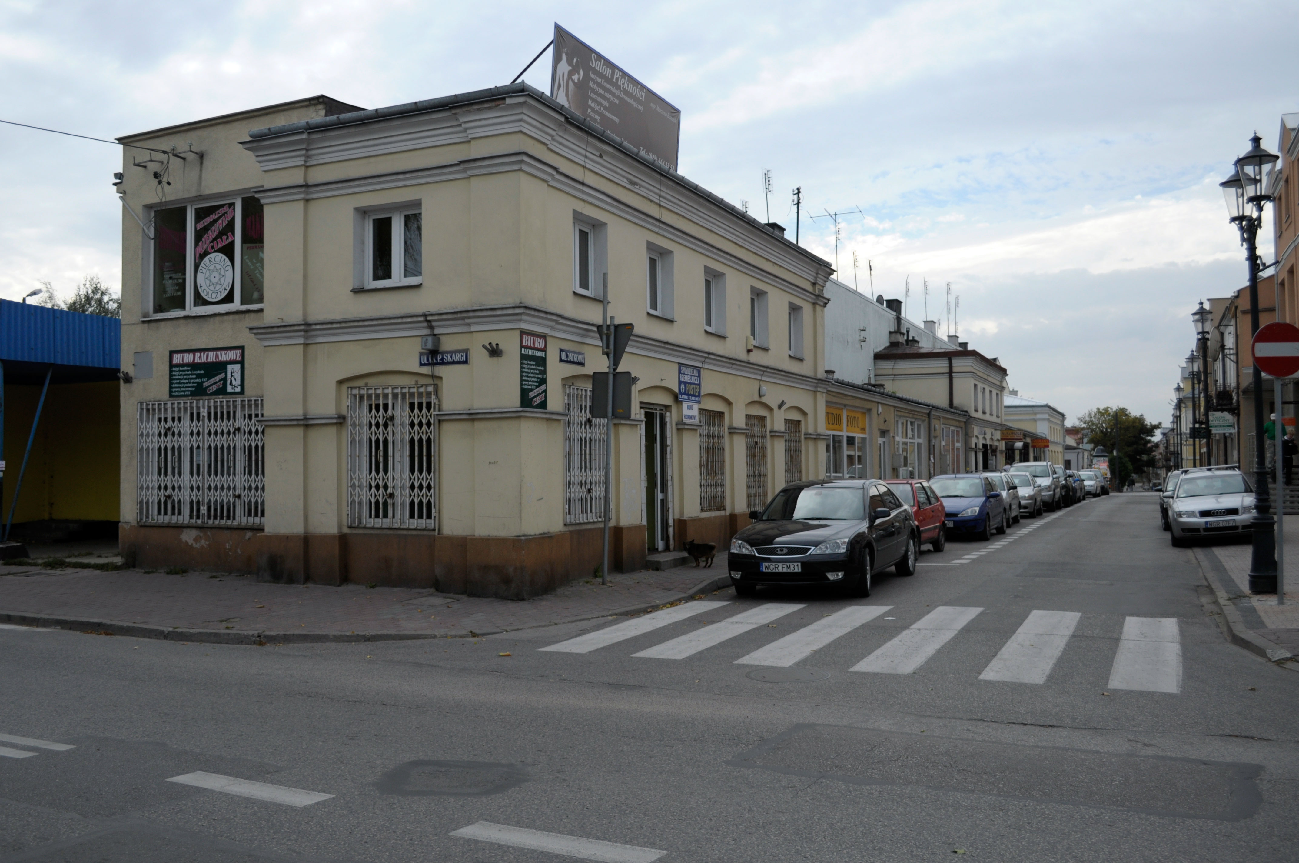 Grójec - jatki miejskie, XIX w. (zabytek nr 474/62)